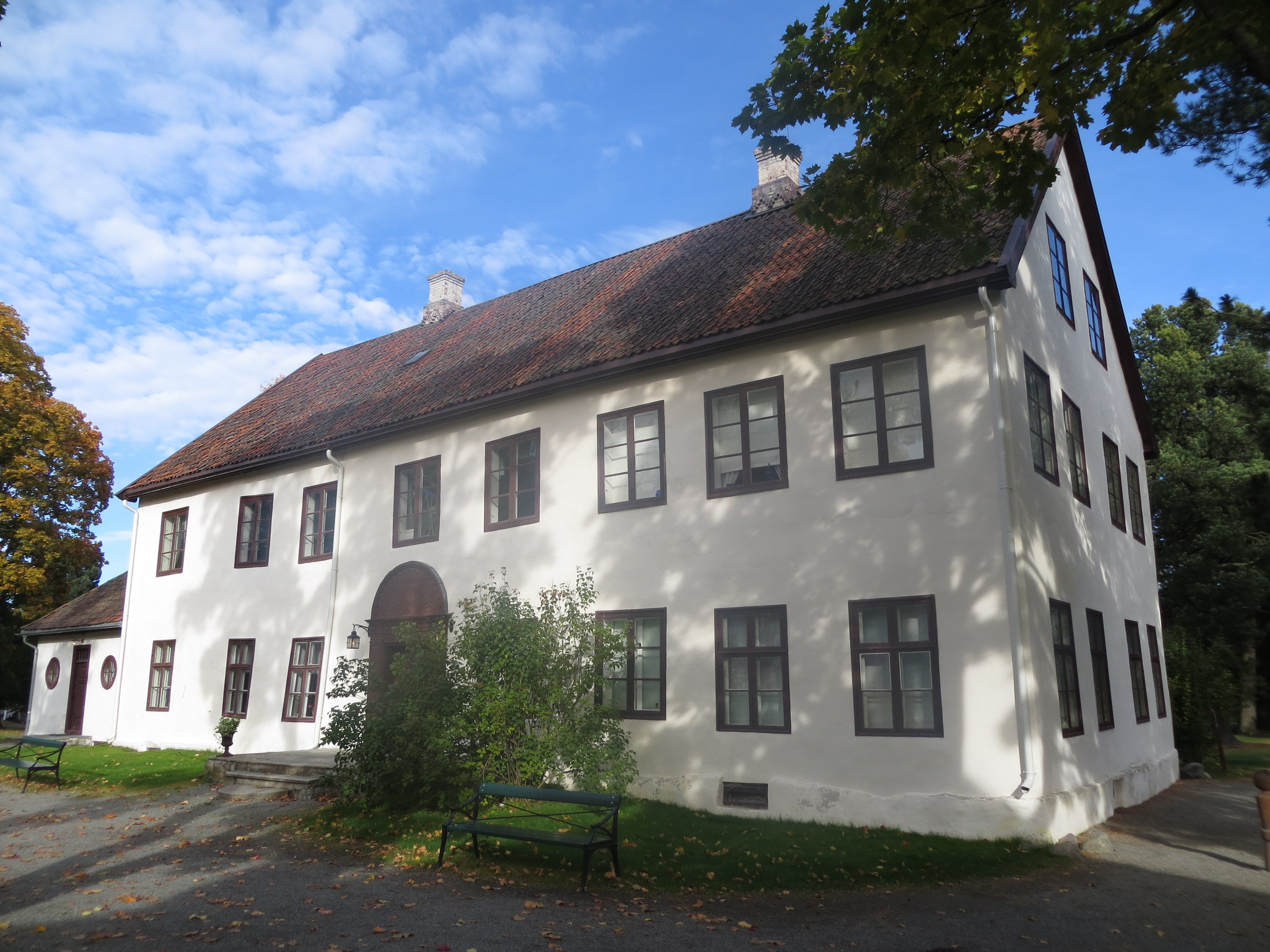 This manor is a cultural heritage site of the city of Gjövik, Oppland county, eastern Norway.